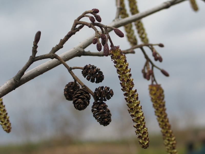 Olsza, zeszłoroczne szyszkowate (ale to nie są szyszki!)kwiatostany żeńskie, kwiatostany tegoroczne (małe) i bazie, walcowate kwiatostany męskie, marzec